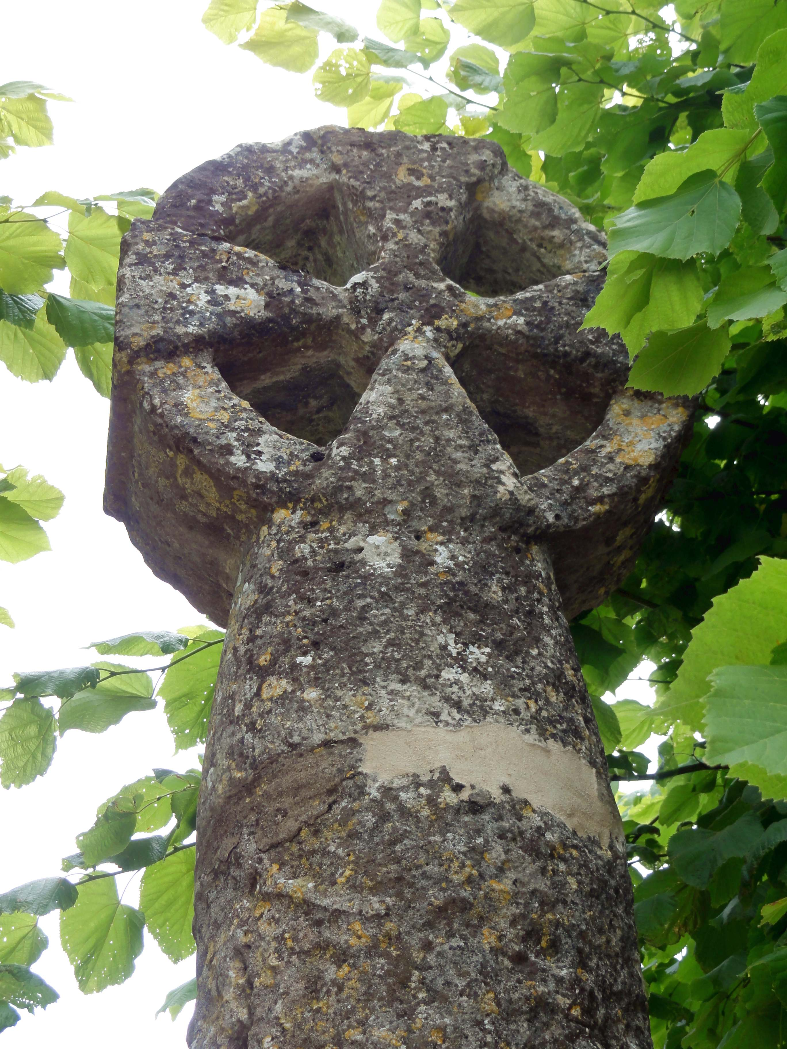 Croix Fromage.